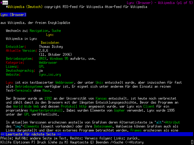 Screenshot des Webbrowsers Lynx 2.8.6 in einem urxvt. Geöffnet ist dabei als Beispiel der Wikipedia-Artikel über den Browser in dieser Artikelversion.